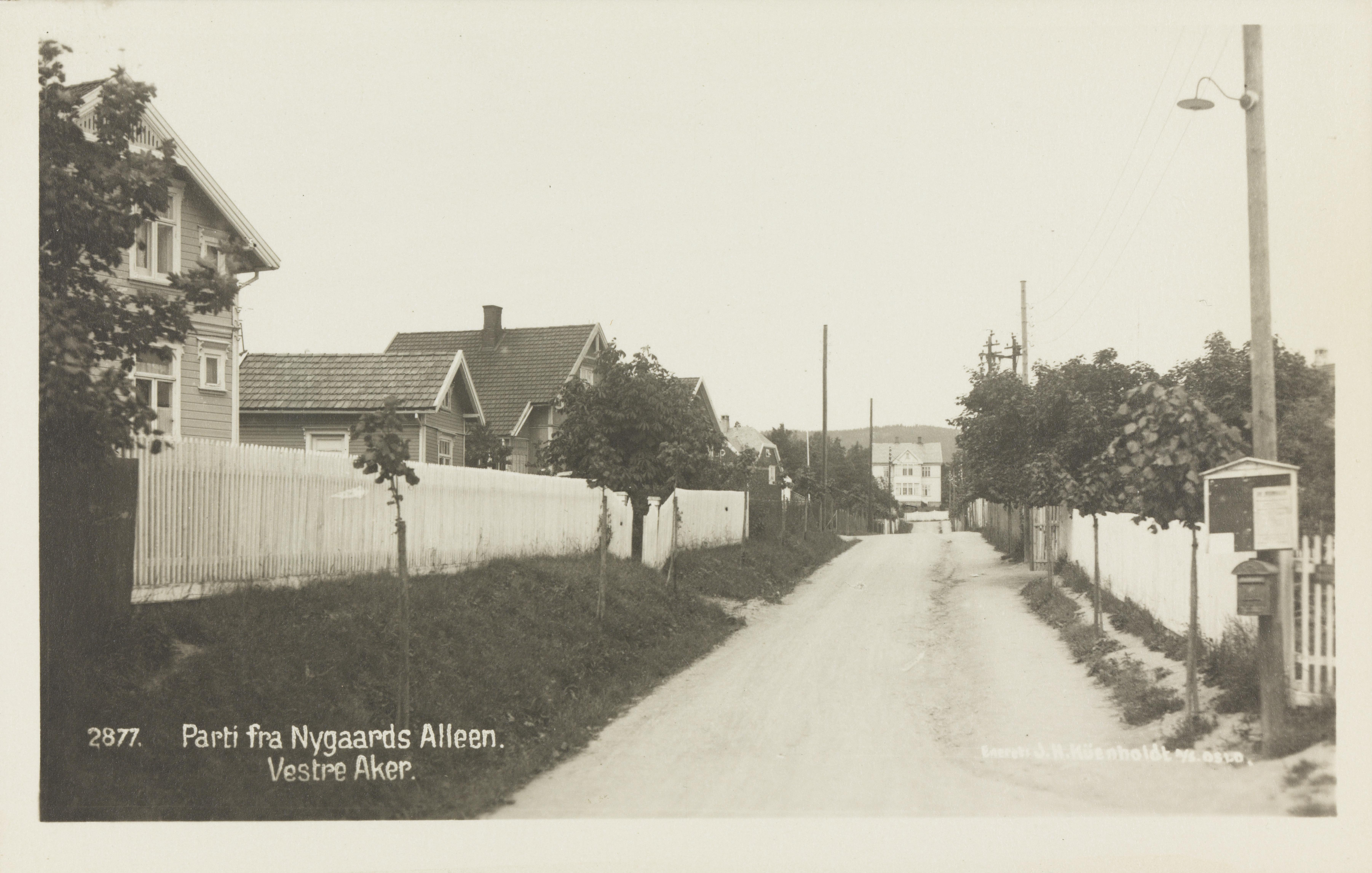 Bildet er hentet fra Nasjonalbibliotekets bildesamling Nygårds allé,Tåsen, Oslo, Oslo